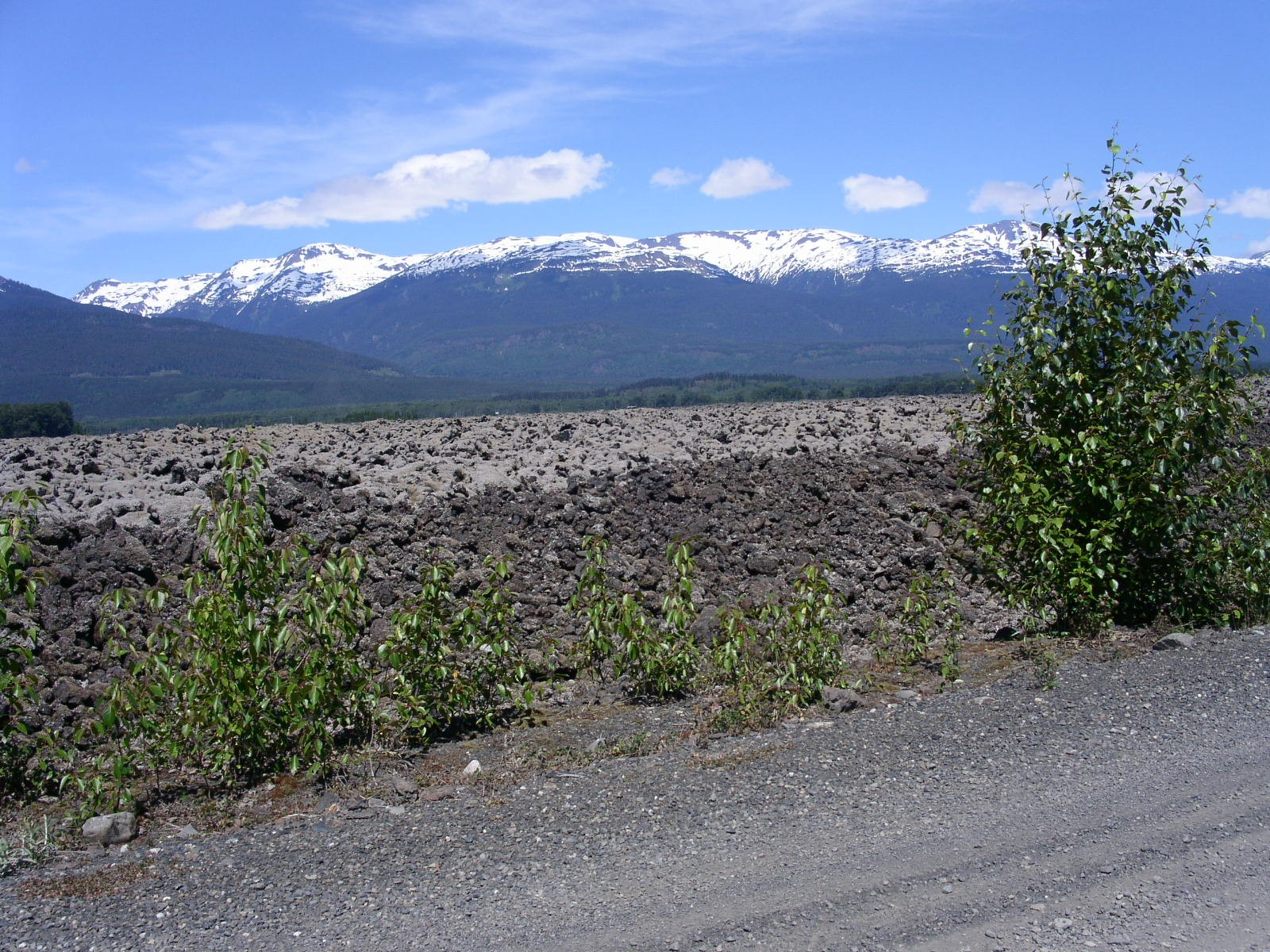 Nass Valley Lava BedsNass Valley Lava Beds